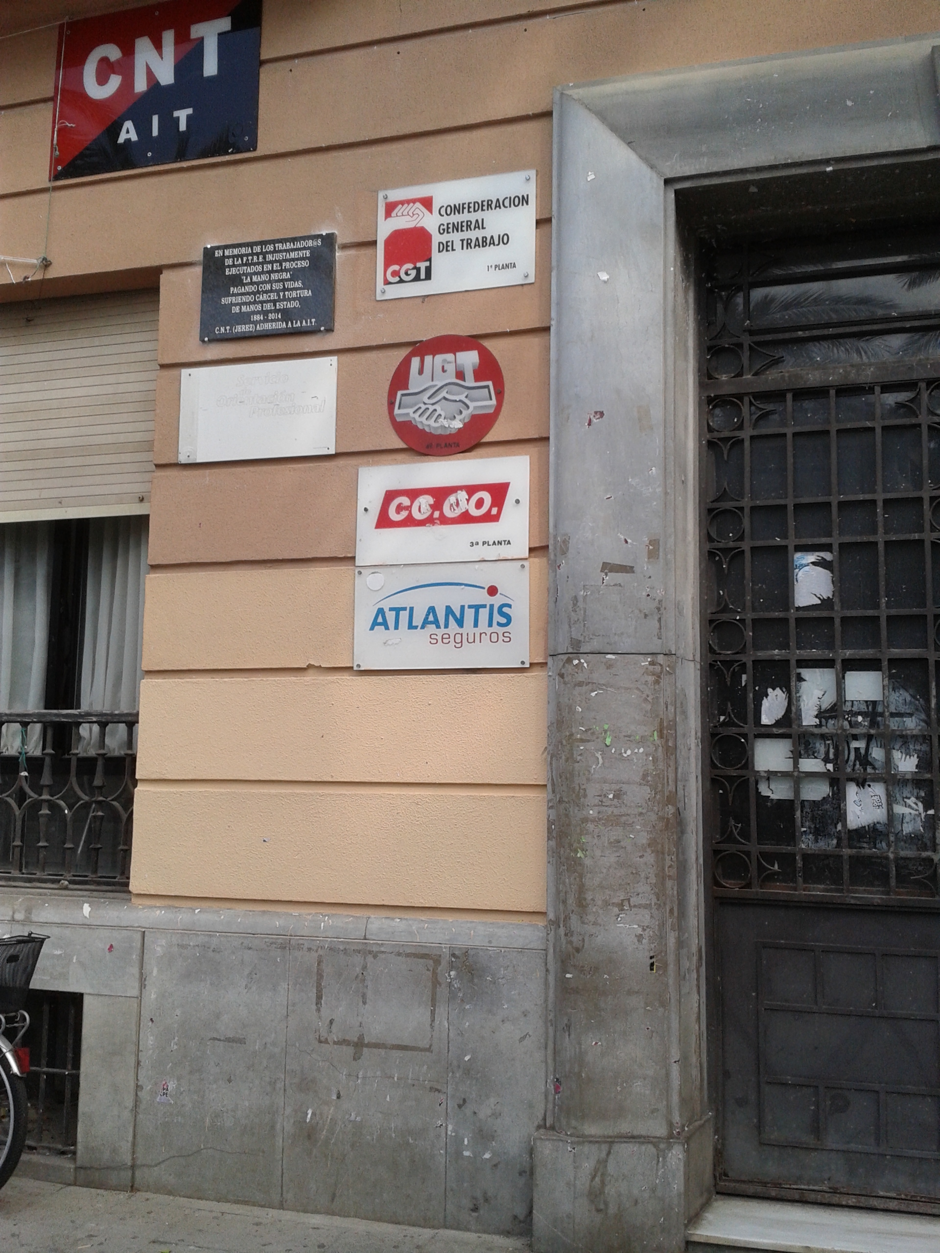 placa la Mano Negra. Edificio Sindicatos Jerez